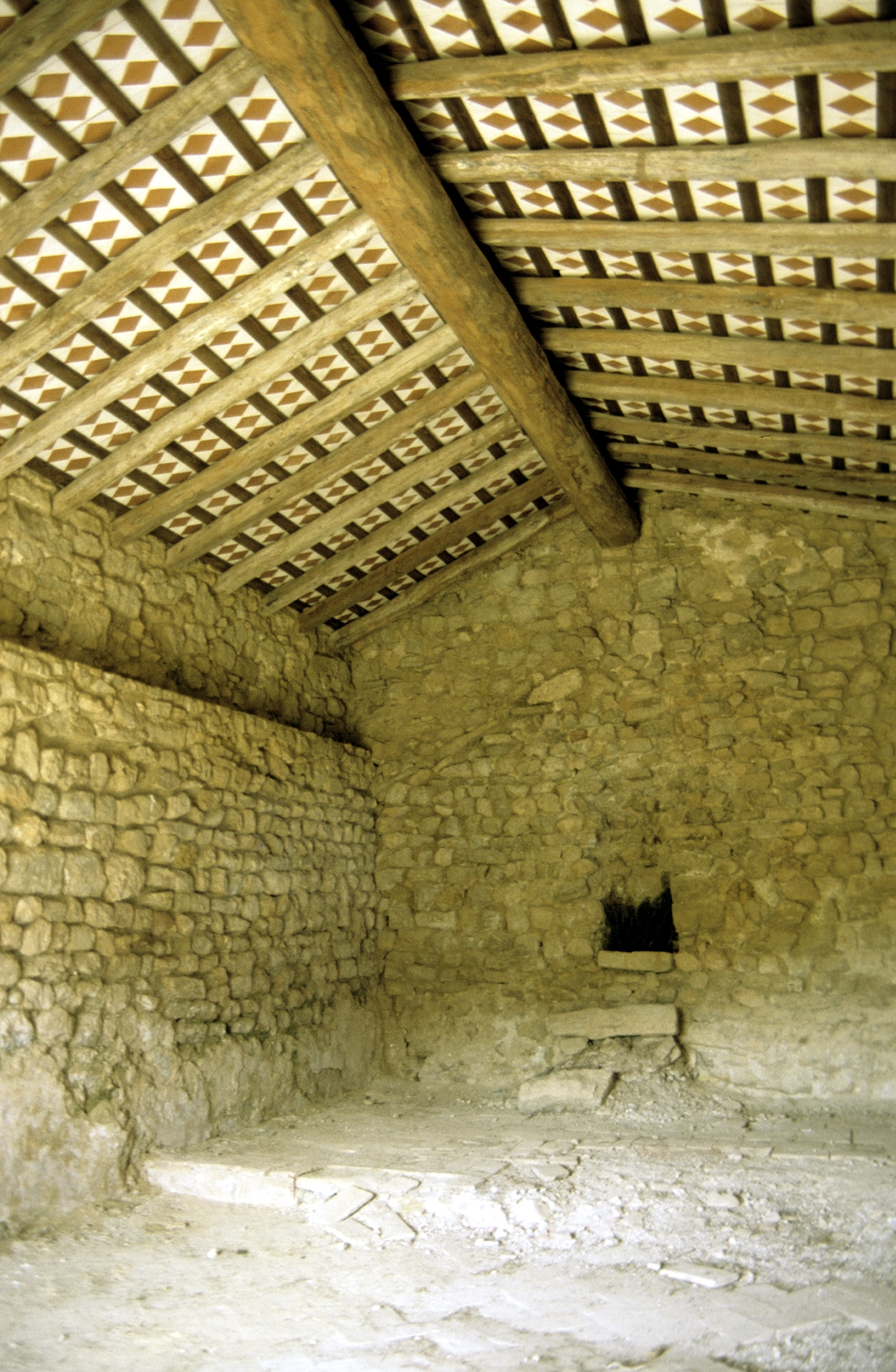 Selma. Capella del mas de Sta. Agnès, interior. Fot. J. Fuguet, 1996.